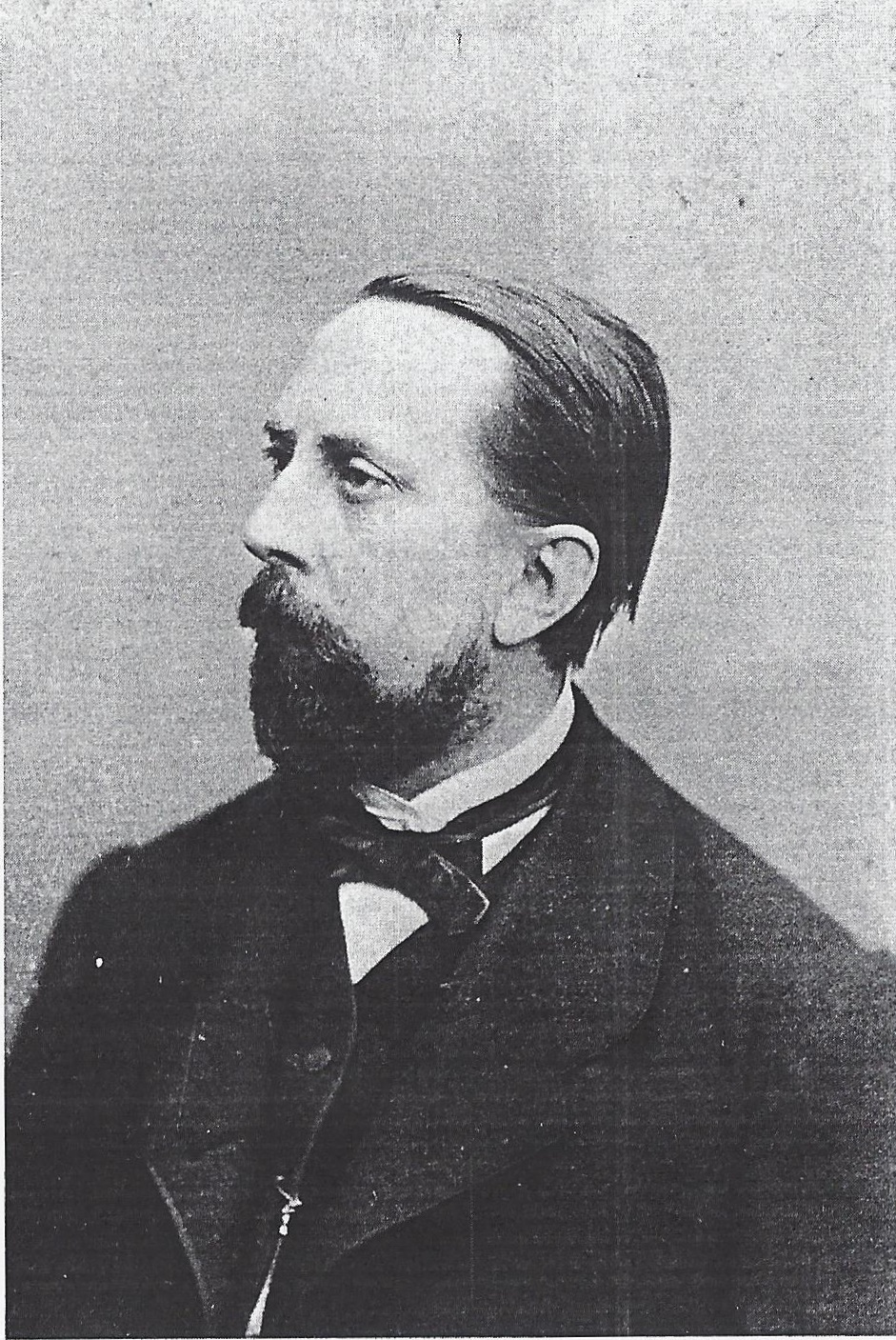 Porträtfotografie von Wilhelm Endemann (1825-1899)